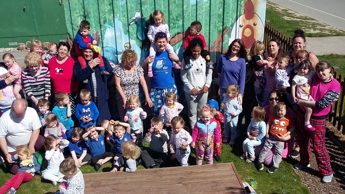 Cylch meithrin Abergele